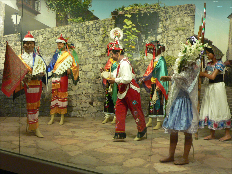 Fête en habits traditionnels